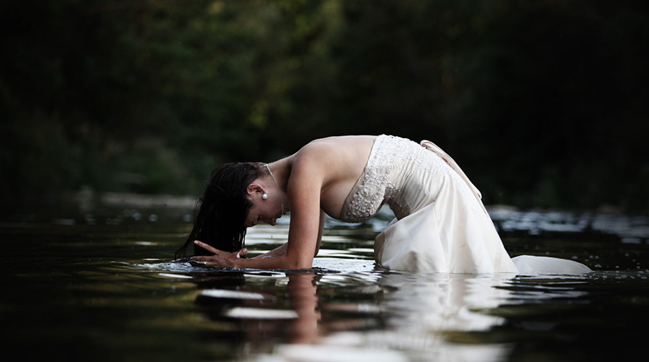 eine ganz spezielle Art der Hochzeitsfotografie